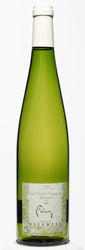 Ostertag Les Vieilles Vignes de Sylvaner 2009